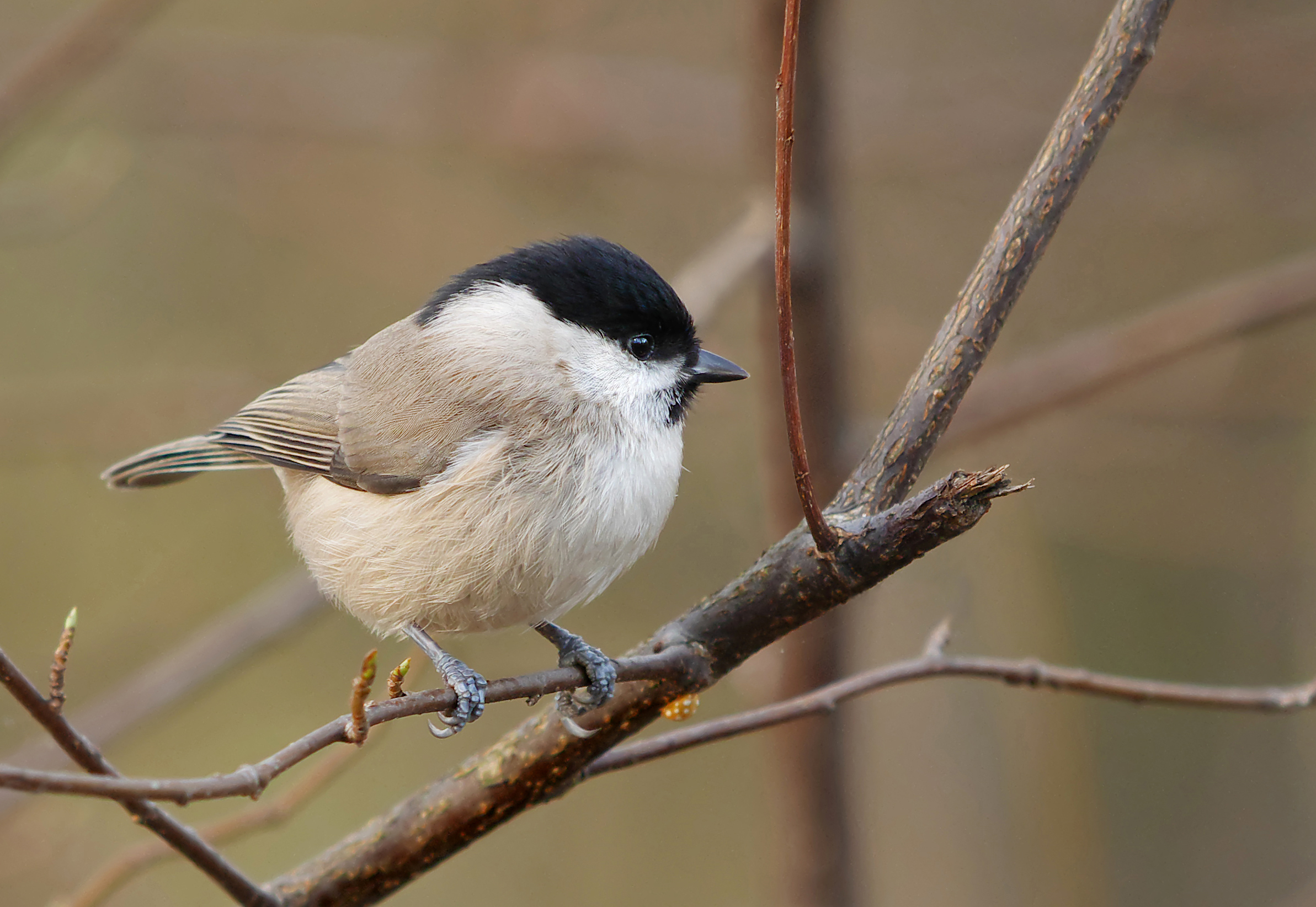 Panasonic GX7 + Panasonic Lumix G Vario 100-300, O.I.S